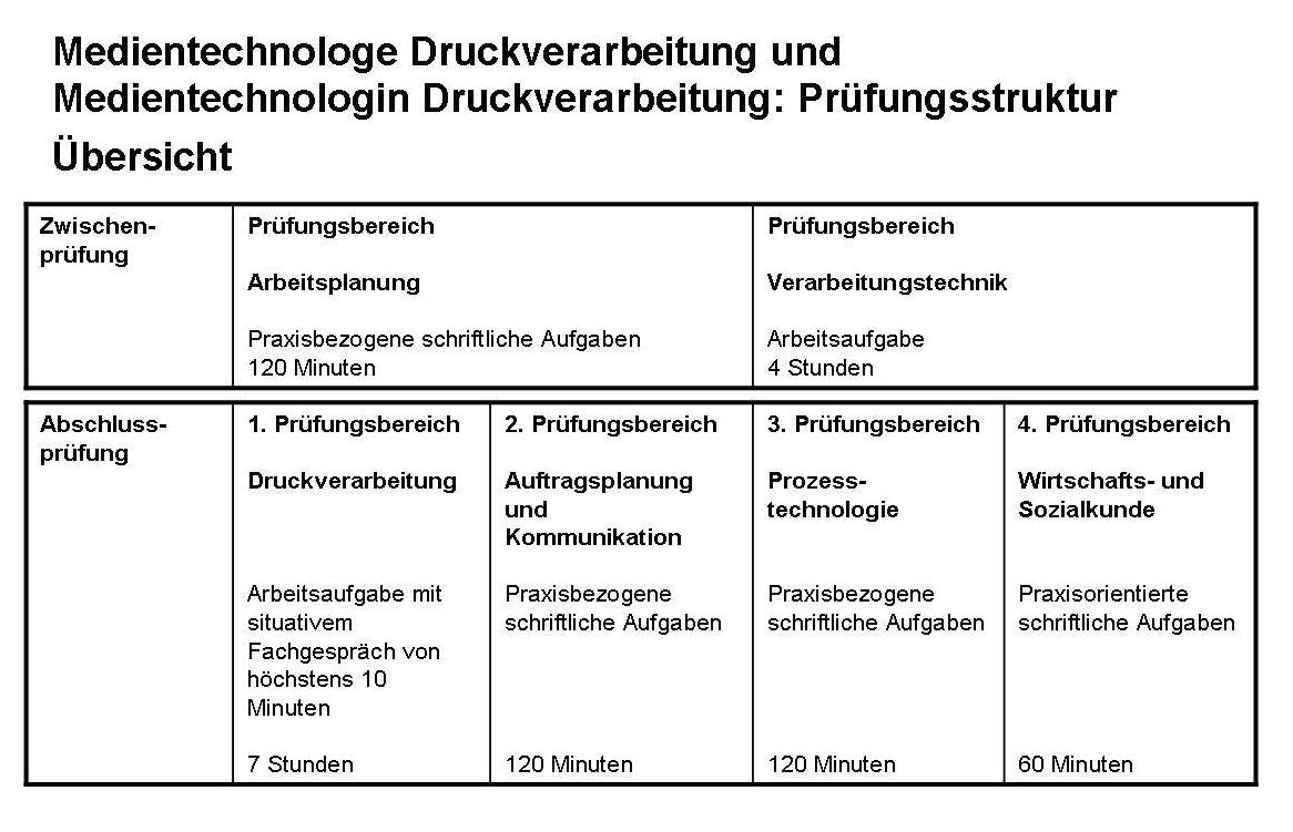 Prüfungsstruktur des dualen Ausbildungsberufes Medientechnologe Druckverarbeitung